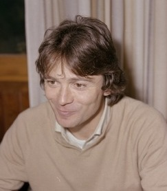 Salva Iriarte in 1981